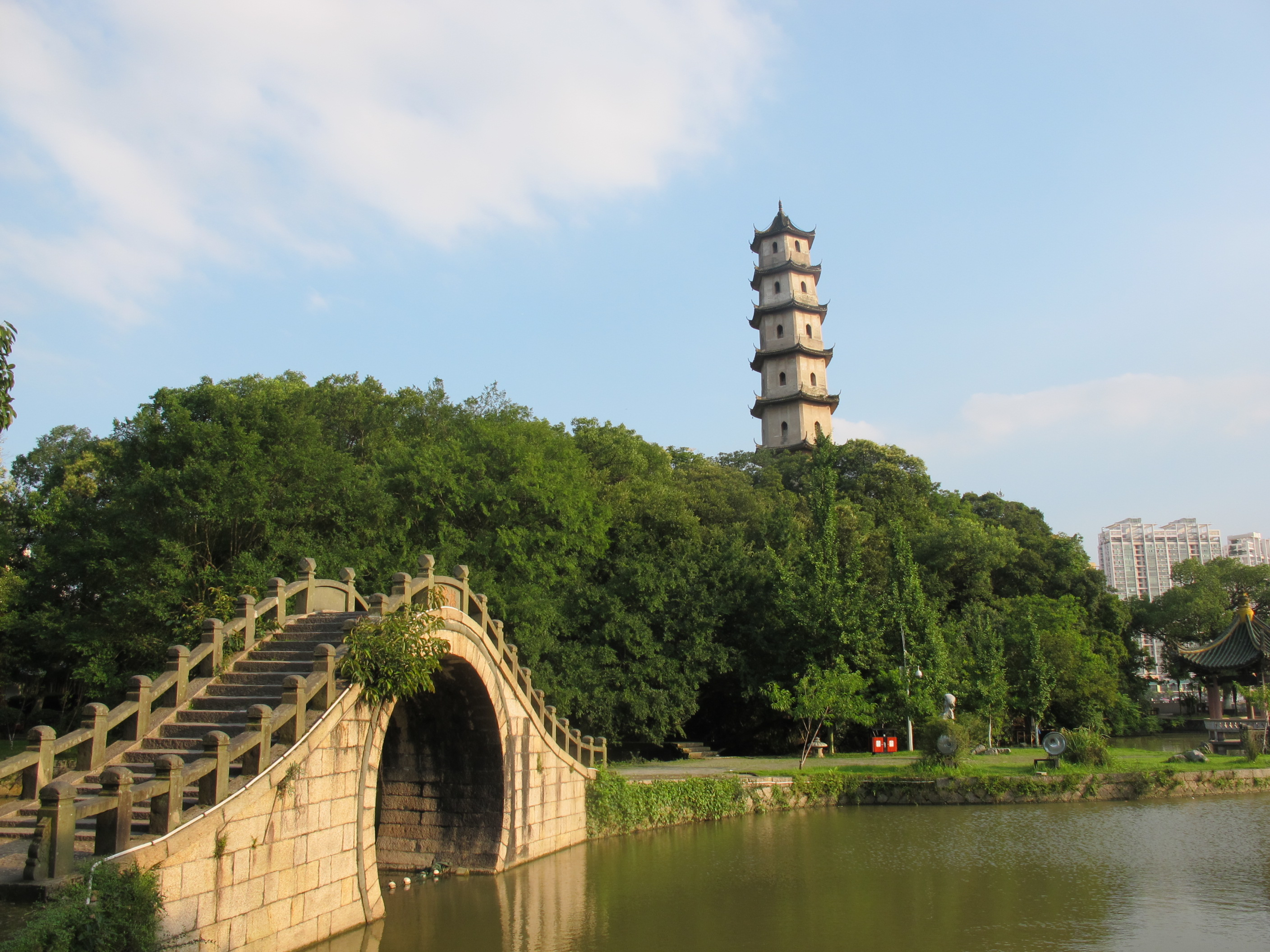 江心屿的西塔与凌云桥